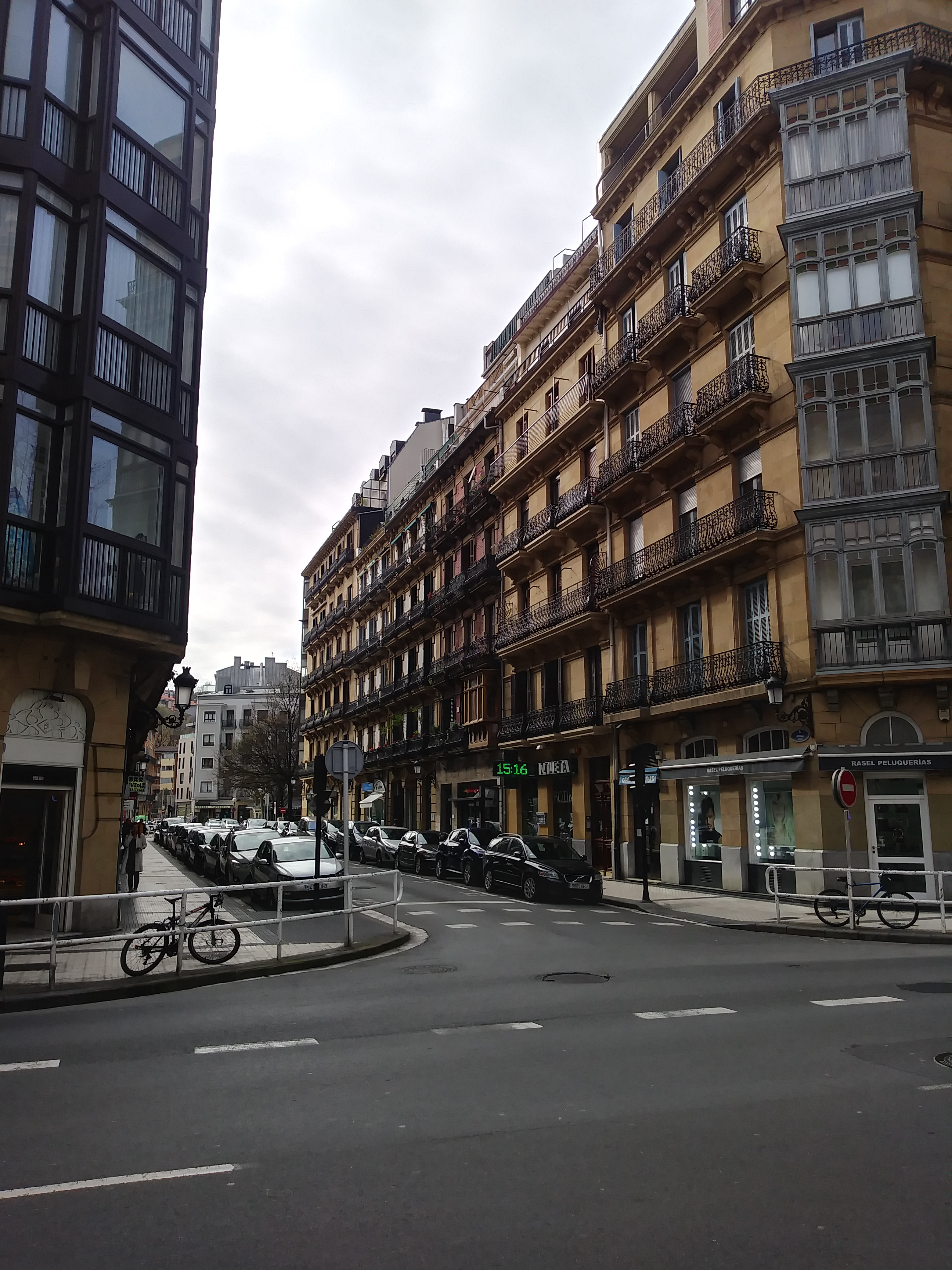 Moraza kalea, Donostia